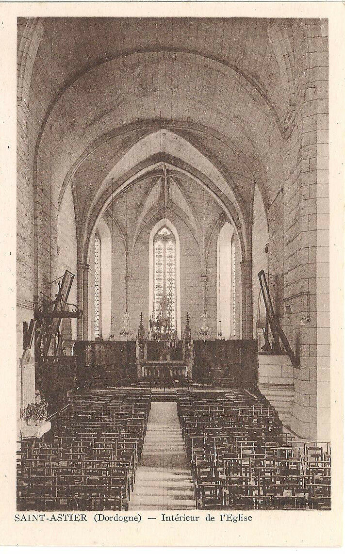 Intérieur de l'église de Saint-Astier. Carte postale vers 1900.